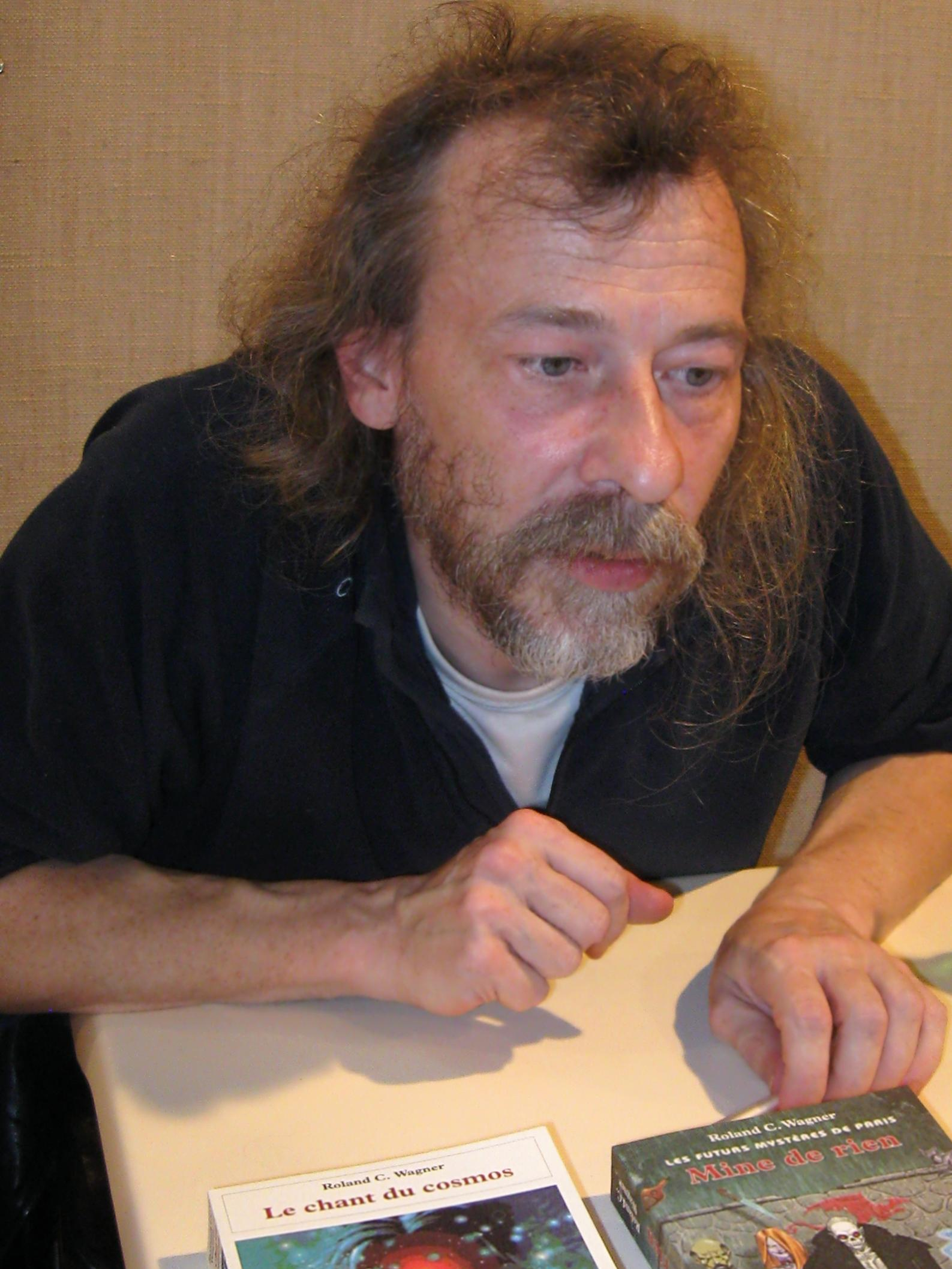 Roland C. Wagner, dec. 2010, 7emes rencontres de l'imaginaire, Sevres, 92, France